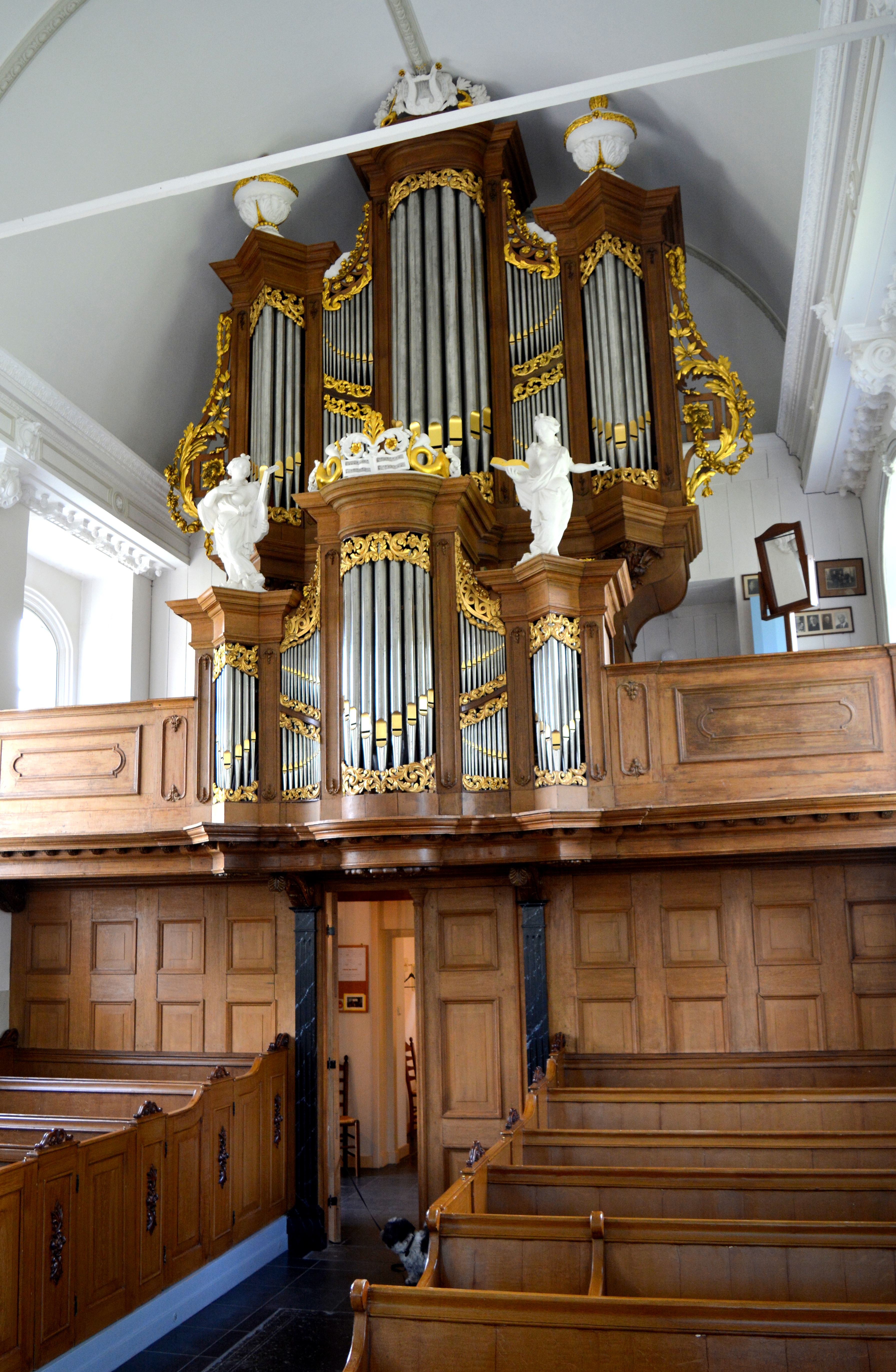 Reduzum, Vincentiustsjerke, oargel